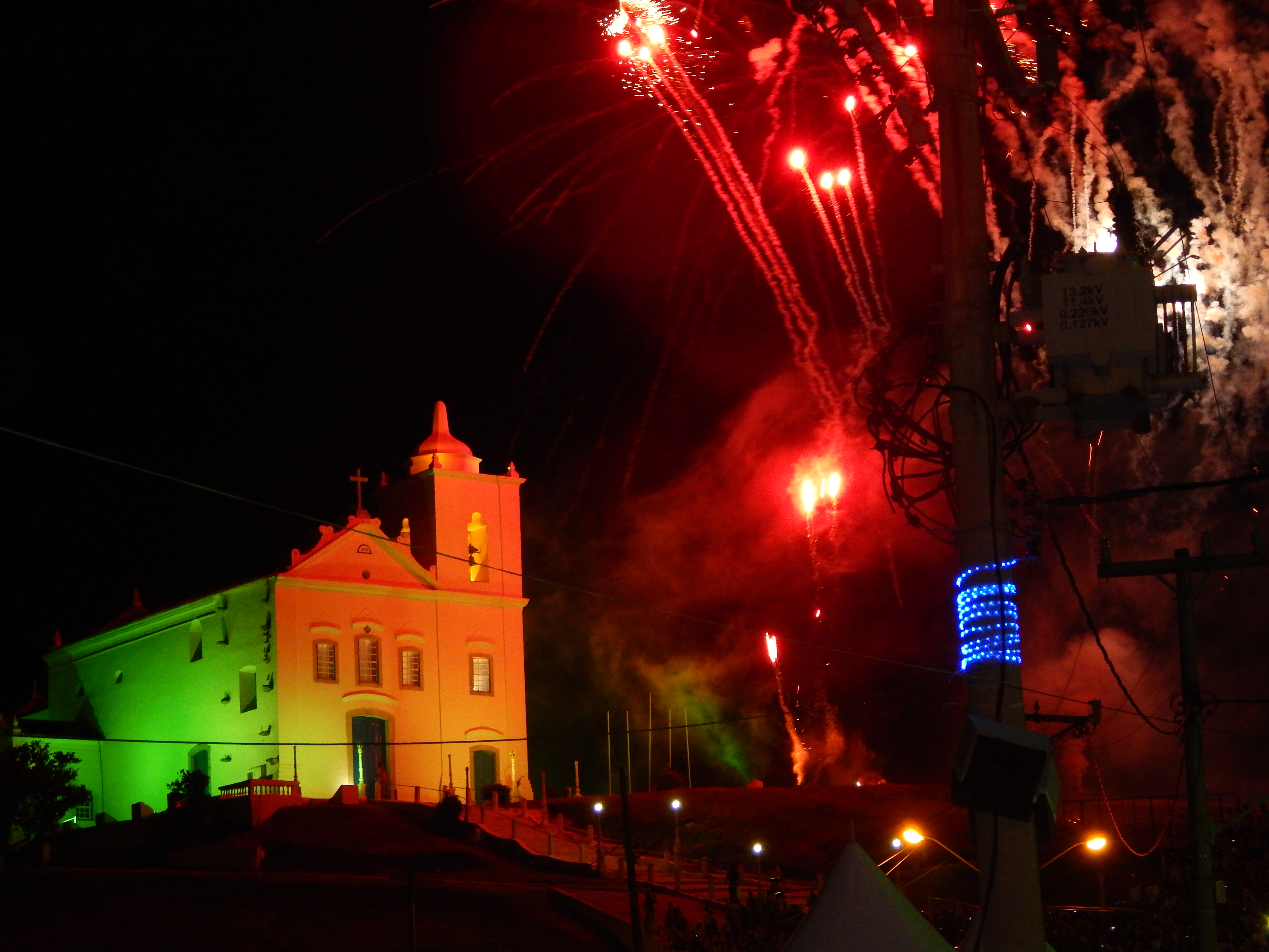 FOTO TIRADA EM 31/12/14 EM SAQUAREMA - RIO DE JANEIRO - BRASIL